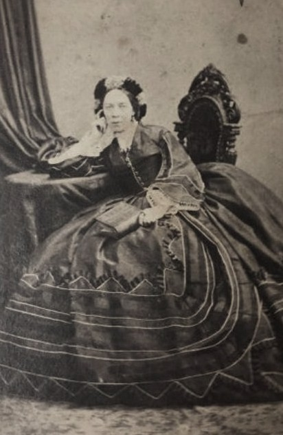 Осипова Екатерина Ивановна (1823-1910)